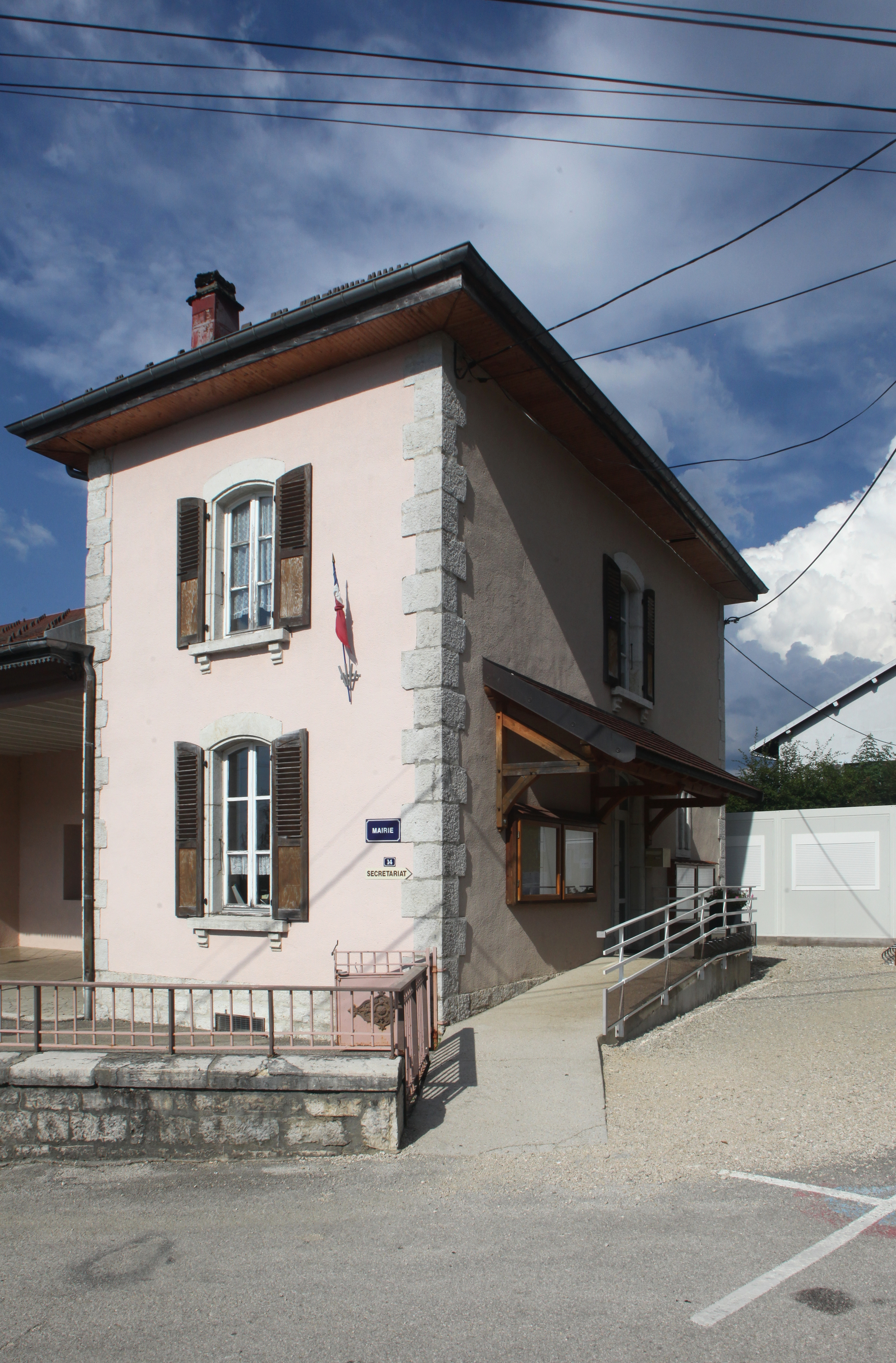 Mairie des Granges-Narboz (Doubs).